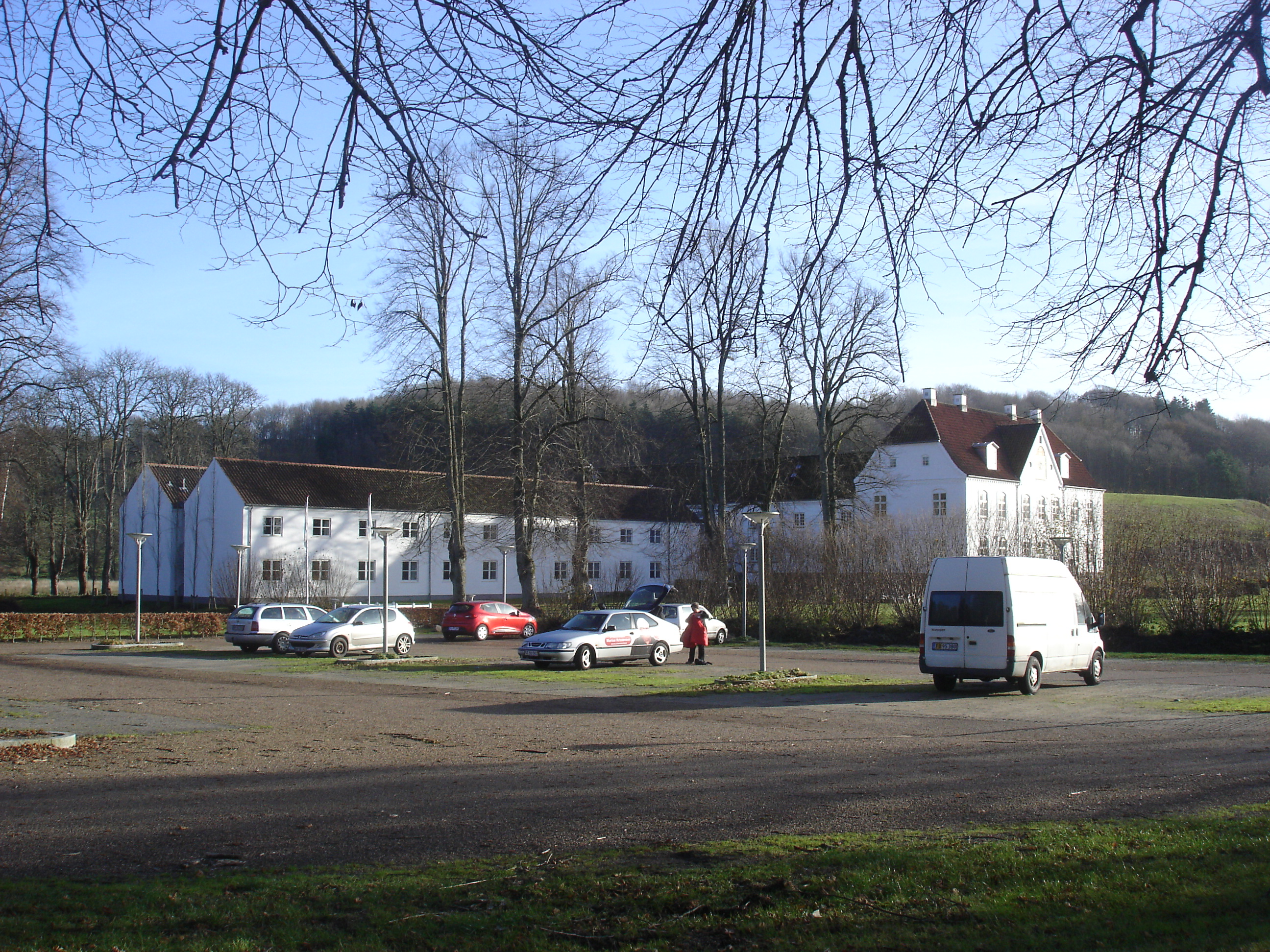 Haraldskær Gods